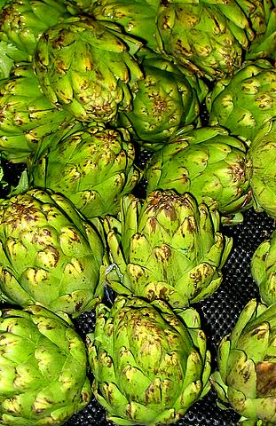 Artichokes at Kroger.